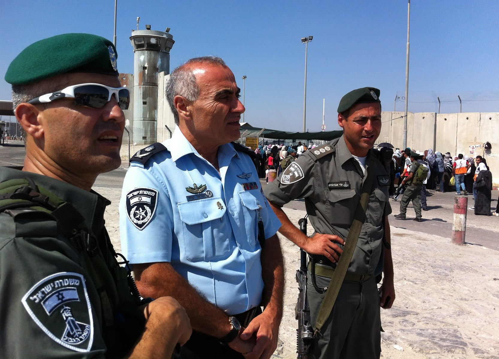 סגן המפקח הכללי, ניצב ישראל יצחק, במעבר קלנדיה. ברקע מאות מתפללים בדרכם לתפילות יום השישי בהר הבית.